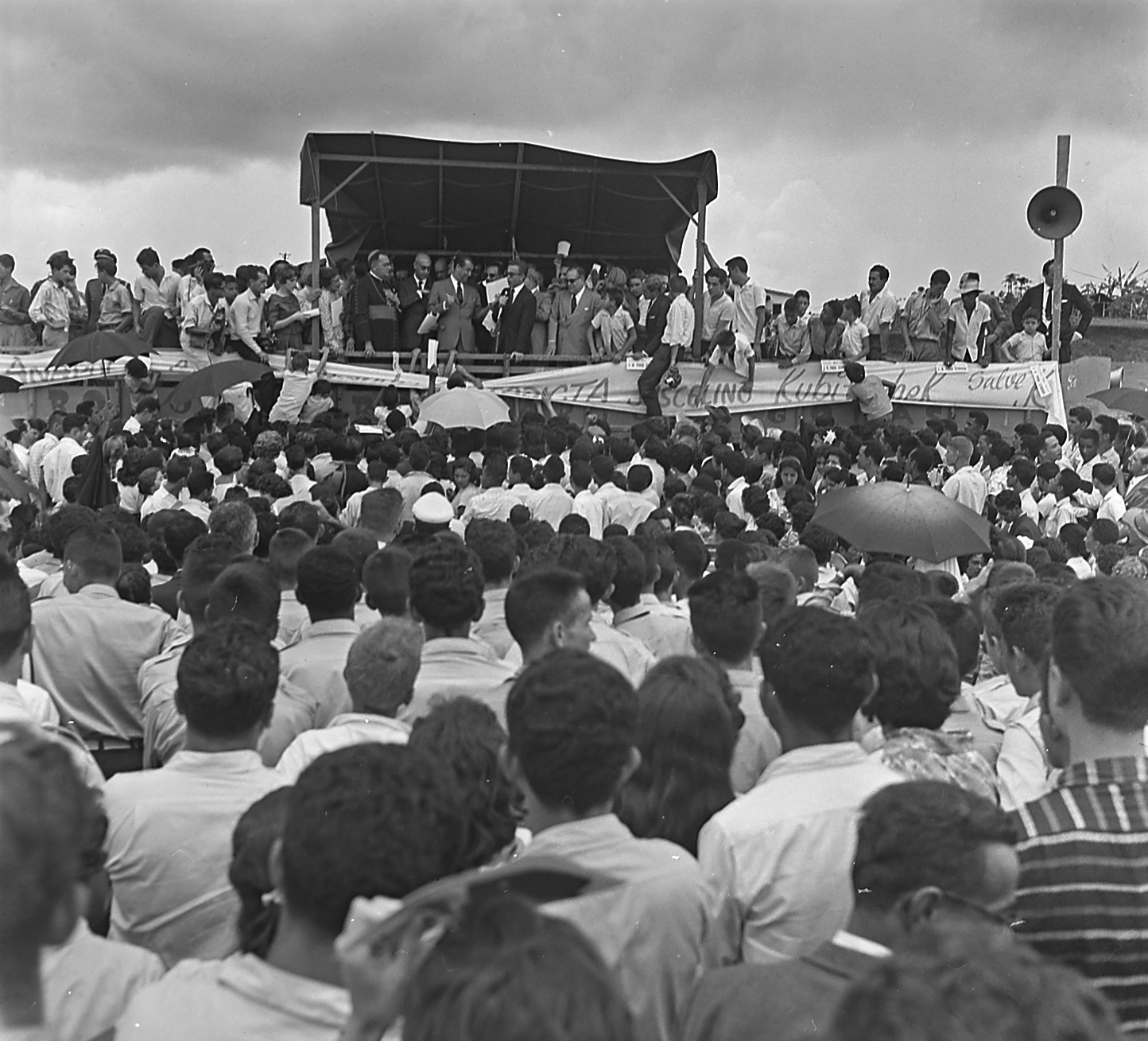 Imagem do Fundo Agência Nacional, do Arquivo Nacional